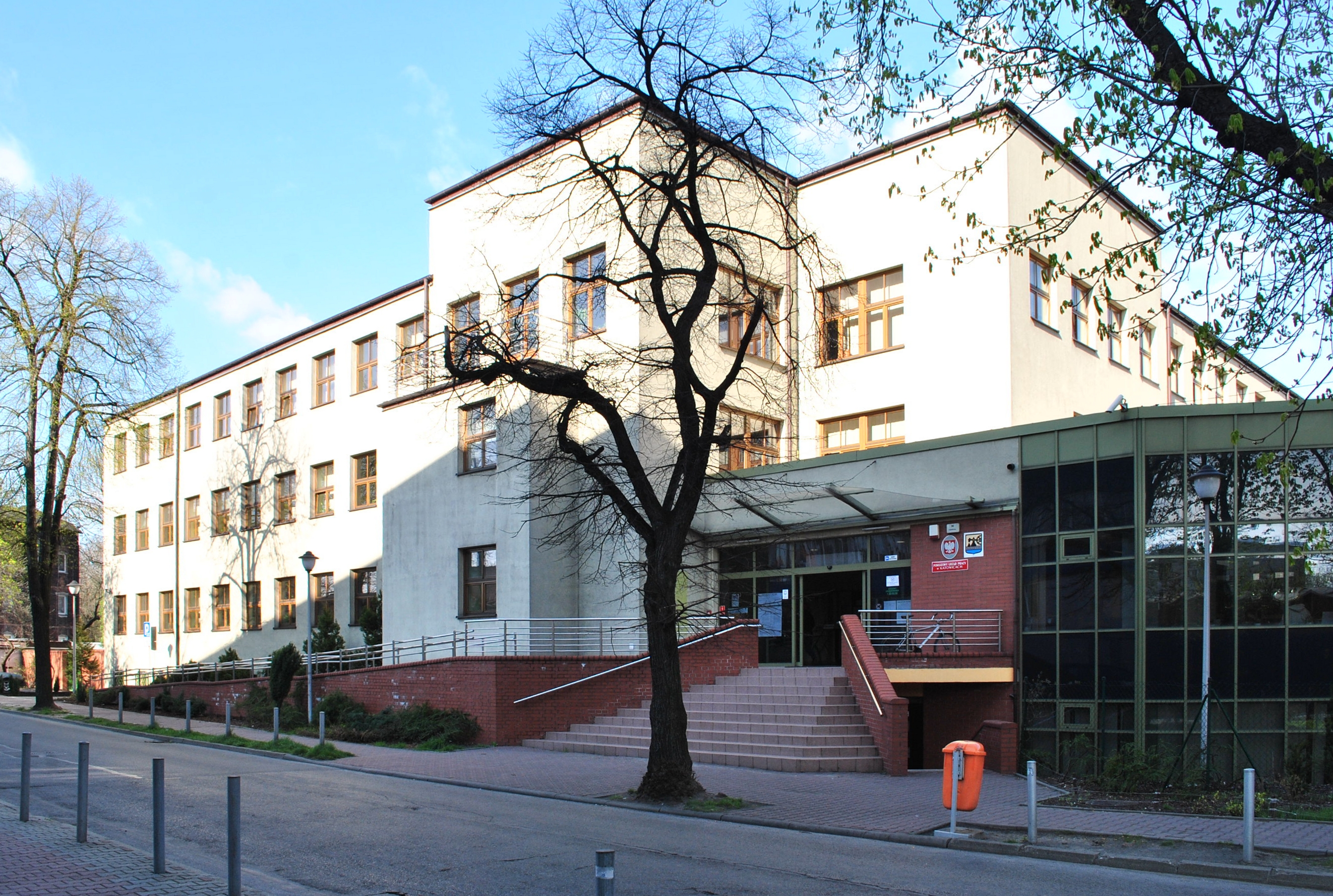 Katowice - Załęże. Powiatowy Urząd Pracy w Katowicach